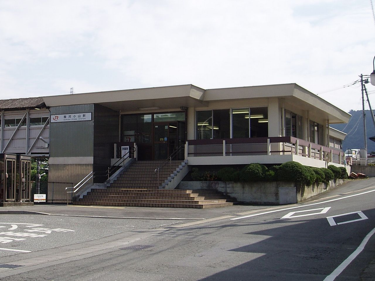 駿河小山駅 駅舎 2007.09.27 投稿者が撮影 Category:鉄道駅画像 Category:東海旅客鉄道の画像